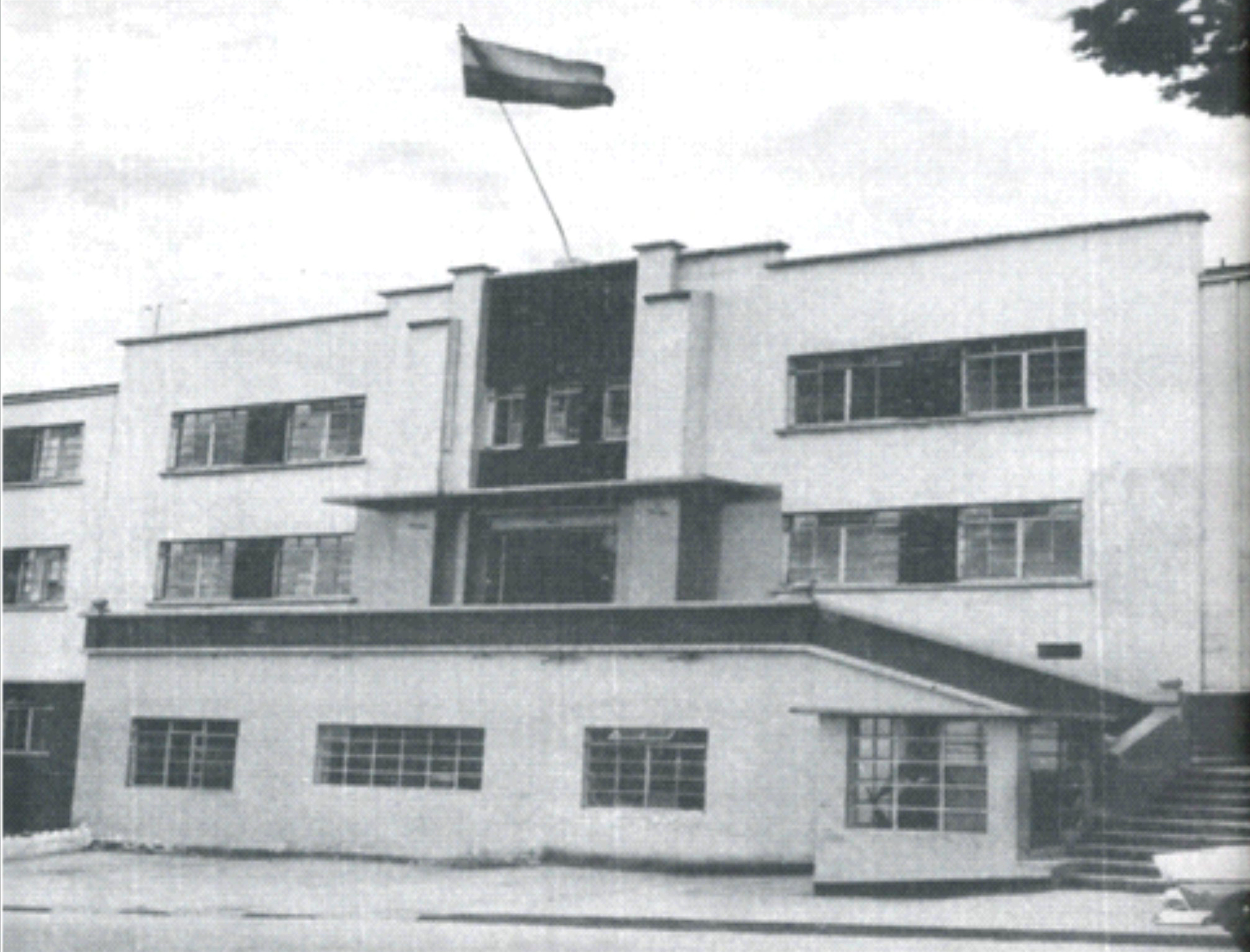 Escuela de Suboficiales y Nivel Ejecutivo, Gonzalo Jimenez de Quesada